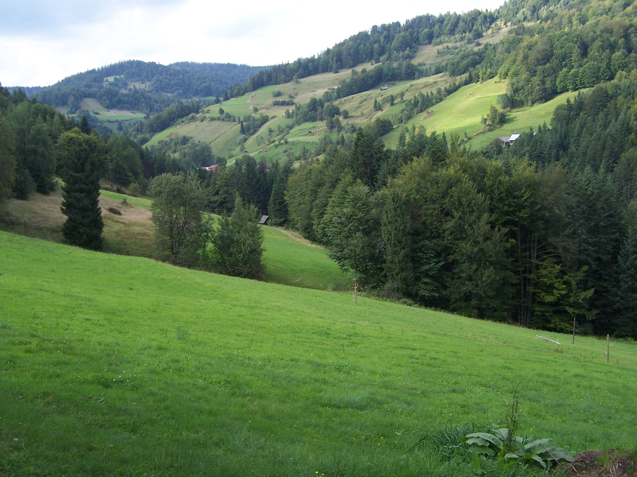 Dolina potoku Jaszcze i przysiółek Duże Jaszcze o Małe Jaszcze w Ochotnicy Górnej